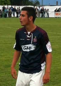 Kevin Ben im Servette-Dress